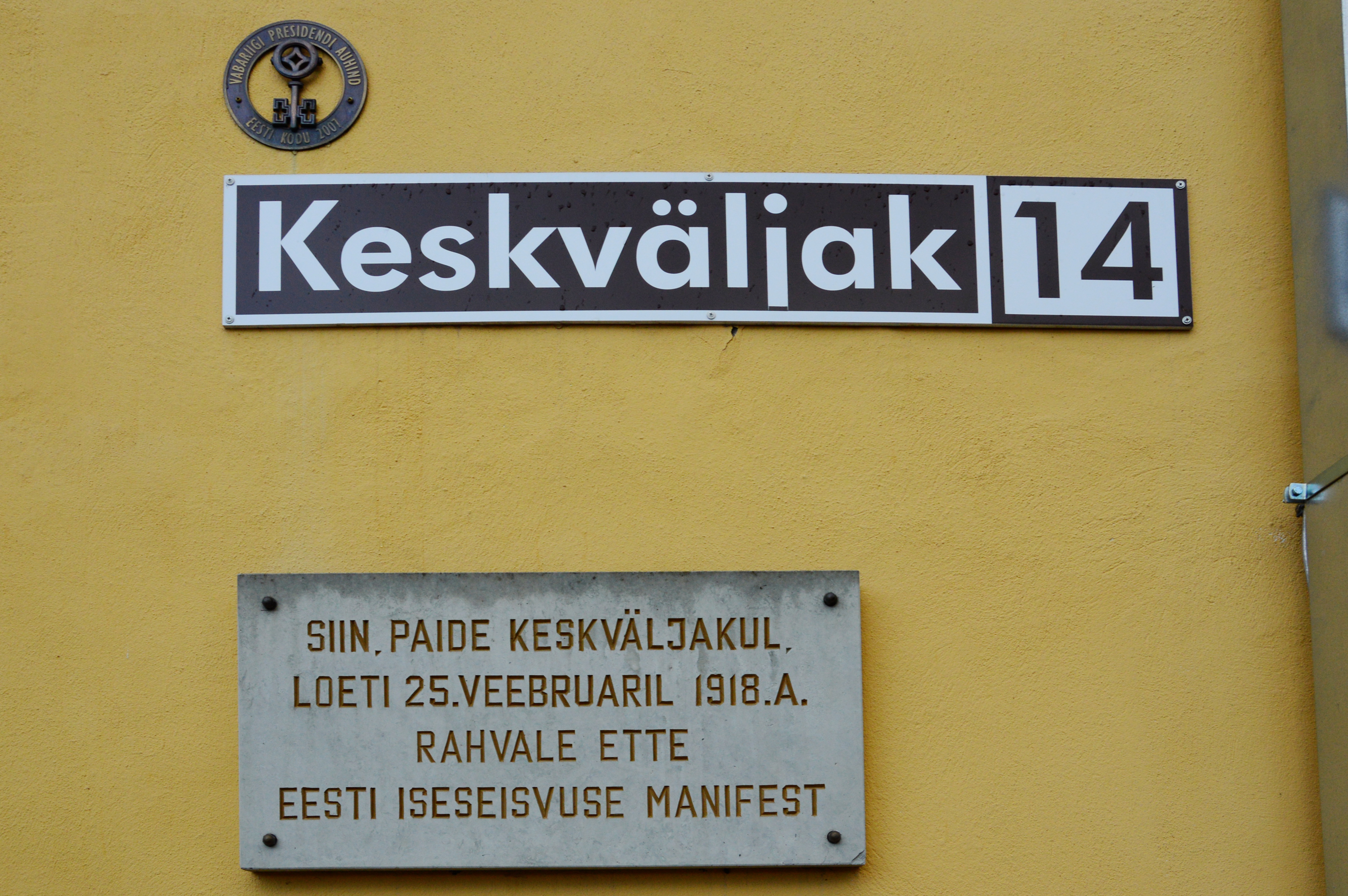 Mälestustahvel Paide raehoone loodenurgal.